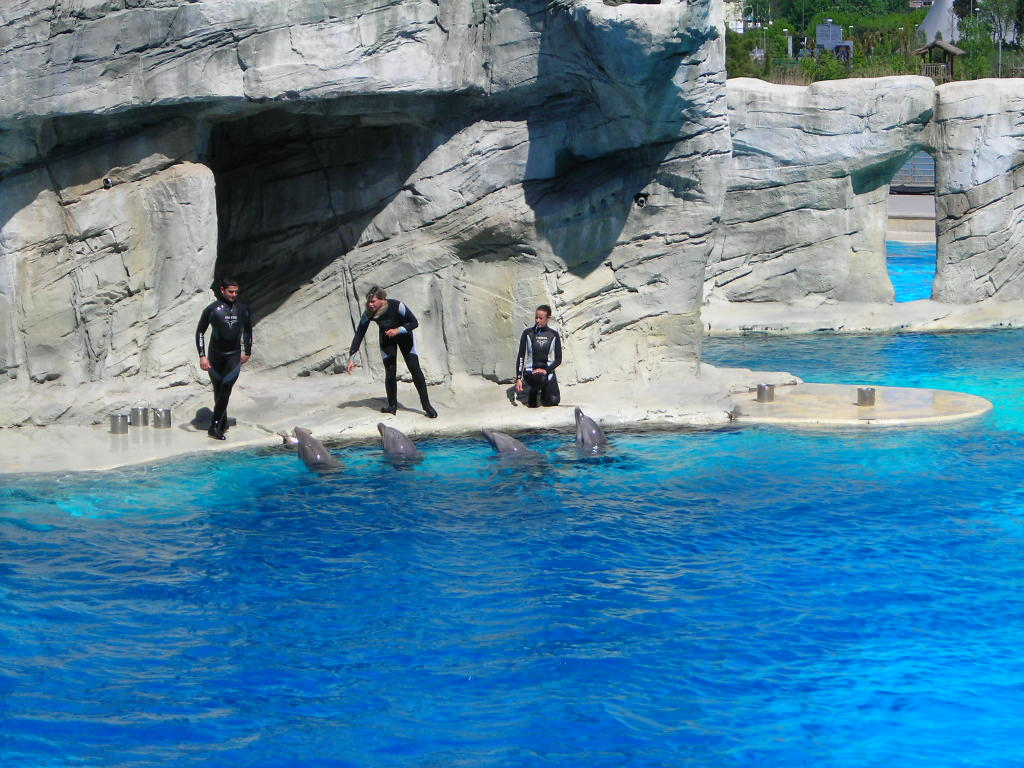 Oltremare (parco)